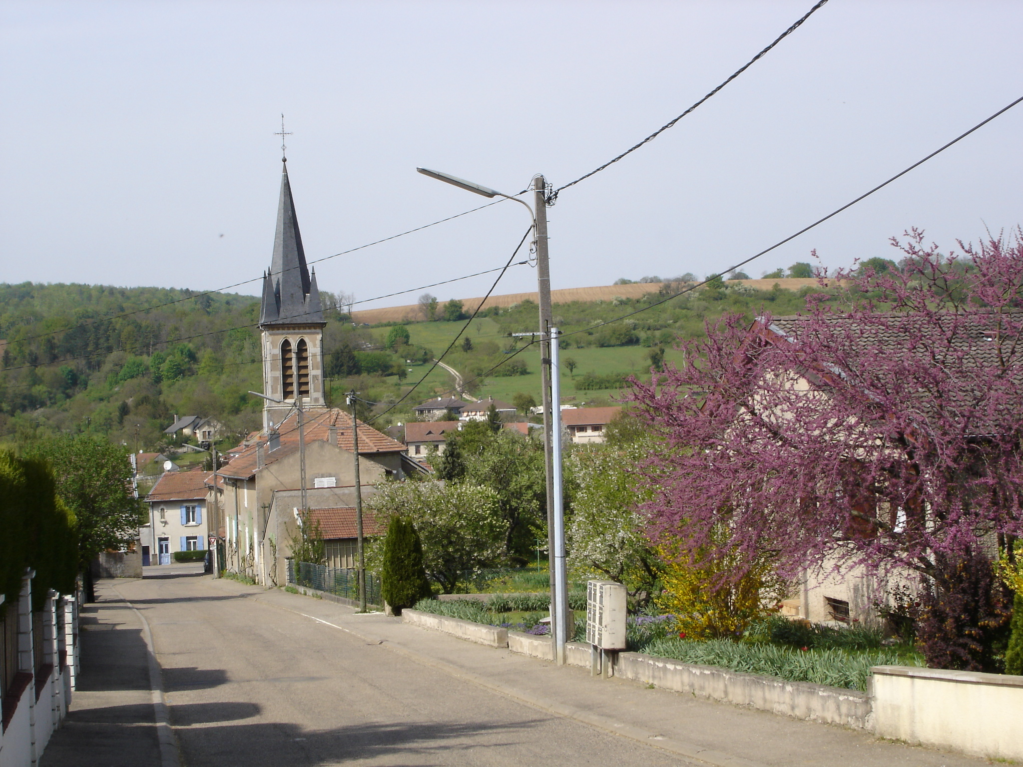 Le village de Montauville en Meurthe-et-Moselle -- Photo amateur prise par moi-même